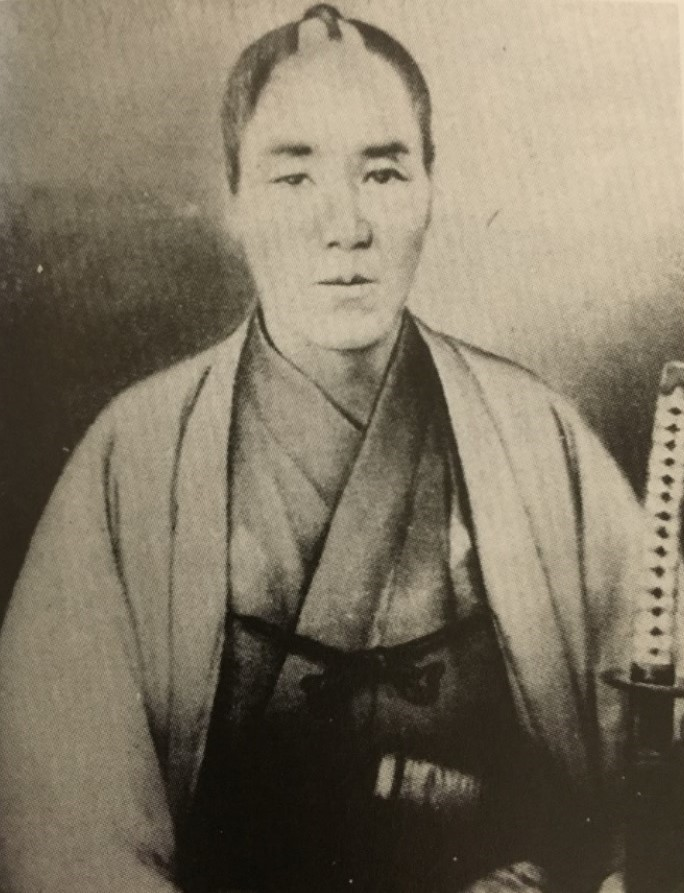 玉虫左太夫の肖像写真。